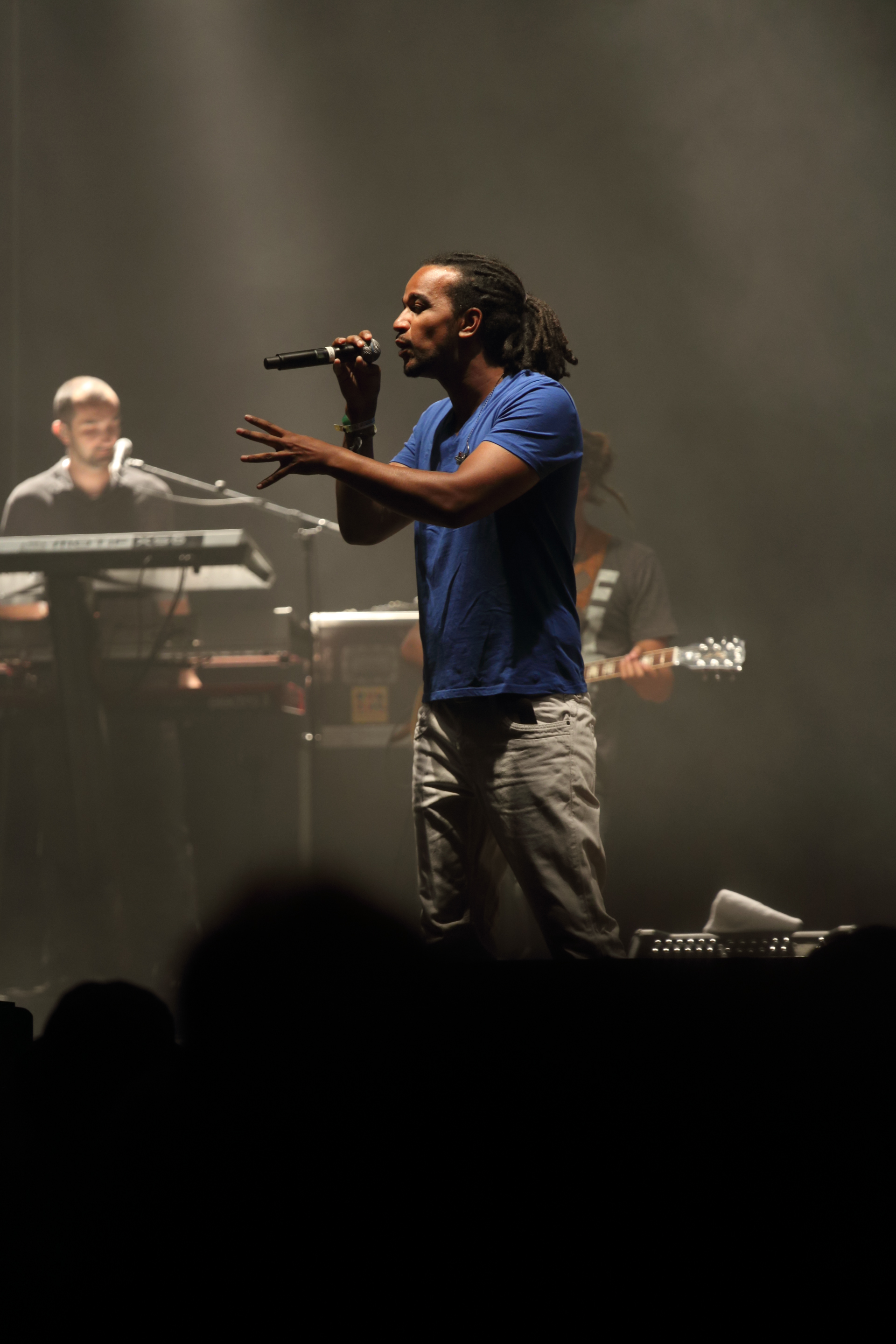 Aurélien Zohou von Dub Inc. auf dem Chiemsee Reggae Summer Festival 2013 Festivalsommer This photo was created with the support of donations to Wikimedia Österreich and Wikimedia Deutschland in the context of the CPB project "Festival Summer".